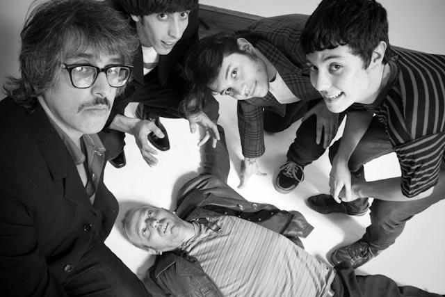 2011 - LOS TELEPATAS